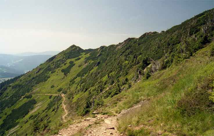 Úbočí Kozích hřbetů autor:Zp